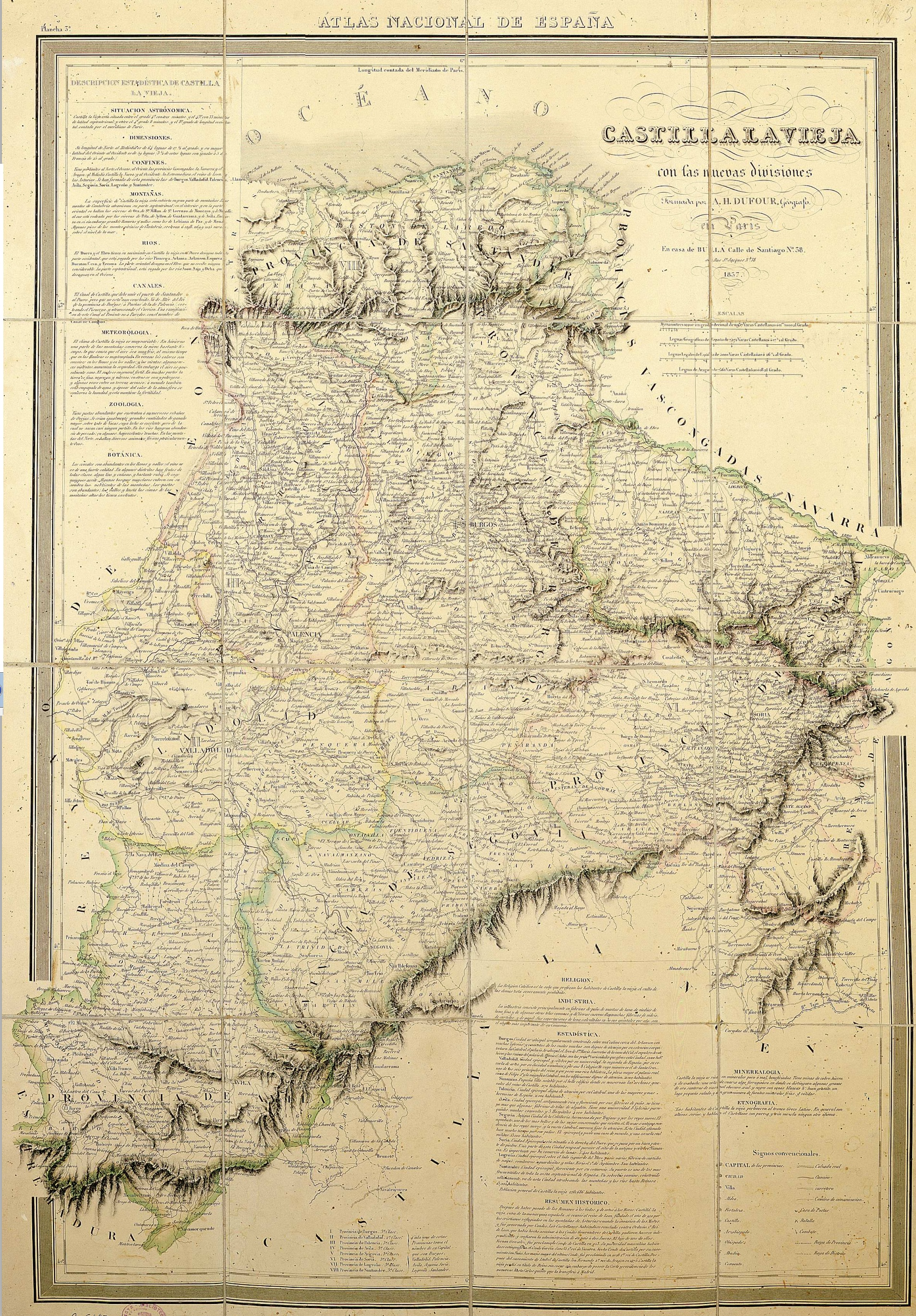 Castilla la Vieja con las nuevas divisiones (A.H. Dufour geógrafo).